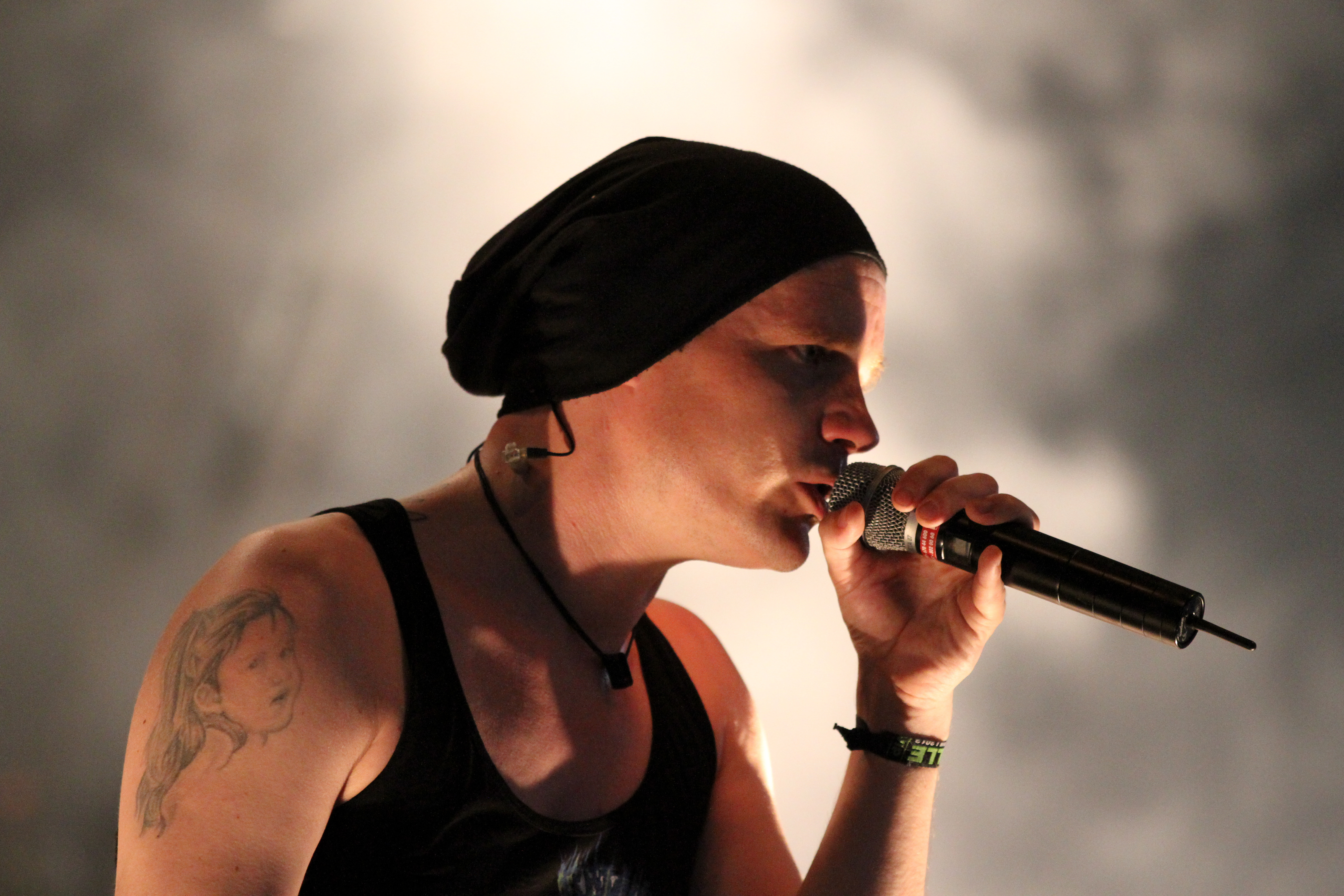 Wave-Gotik-Treffen w 2013 r. w Lipsku.